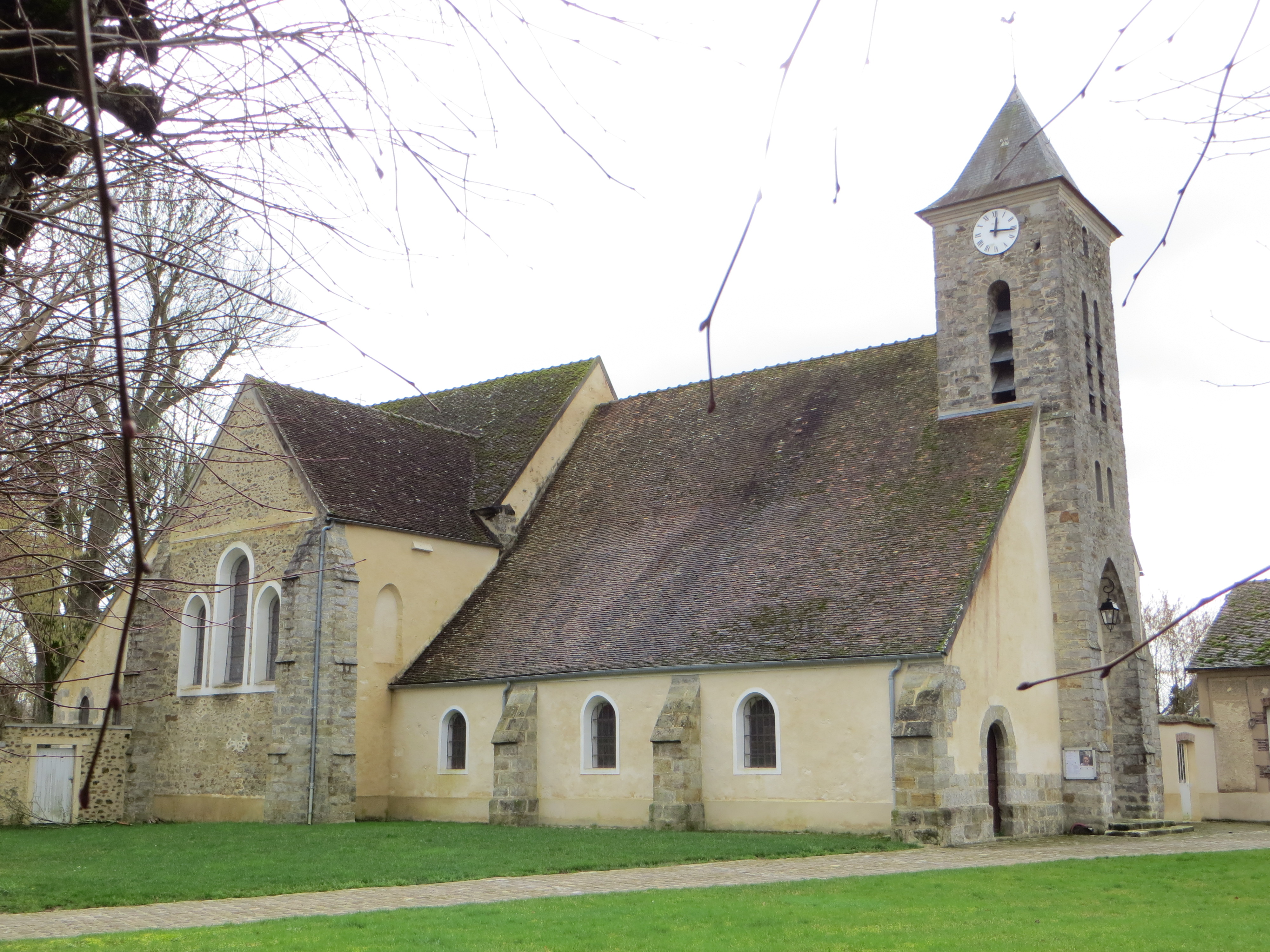 Vue générale de l'église